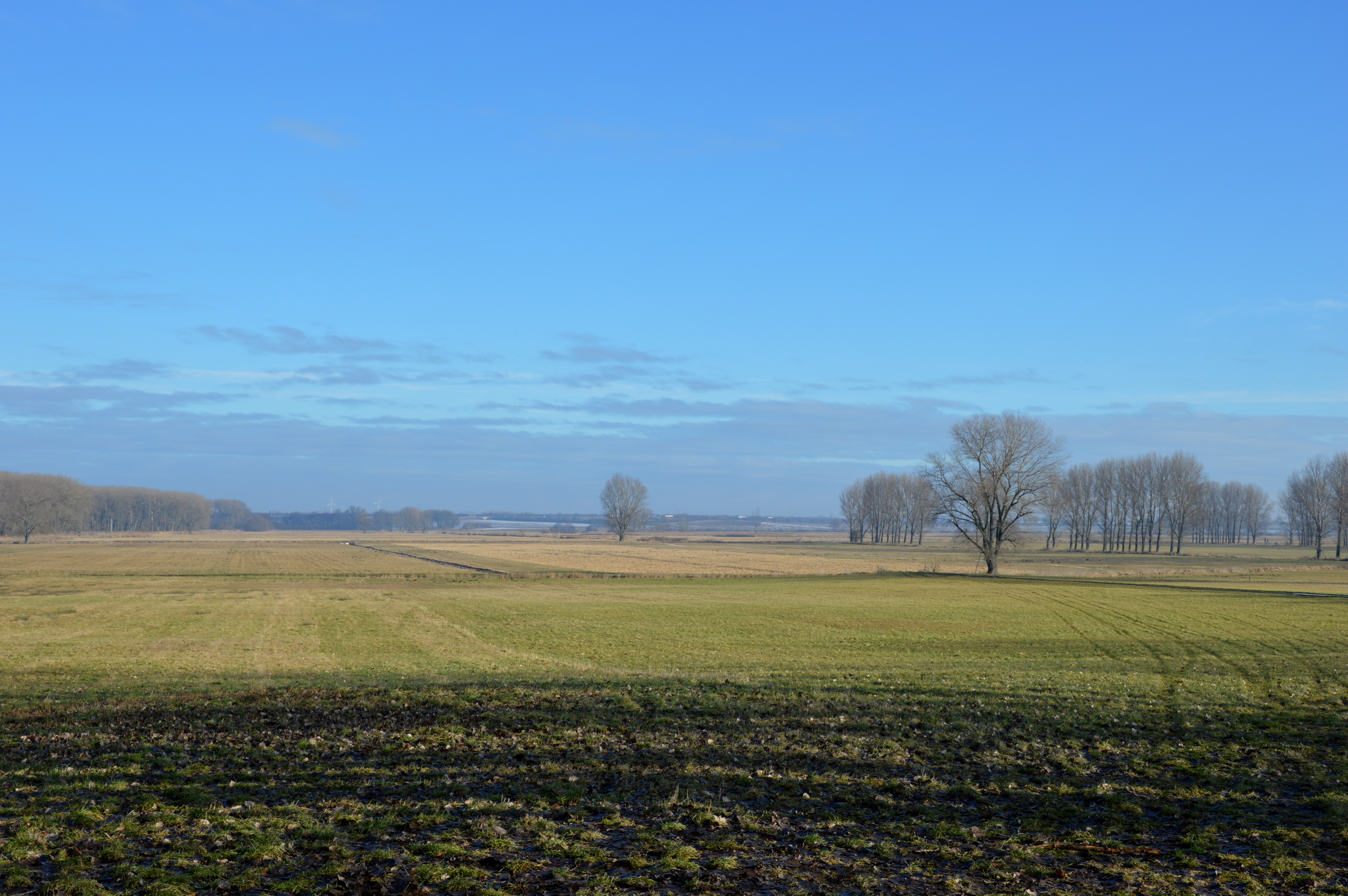 Blick auf den Seelschen Bruch